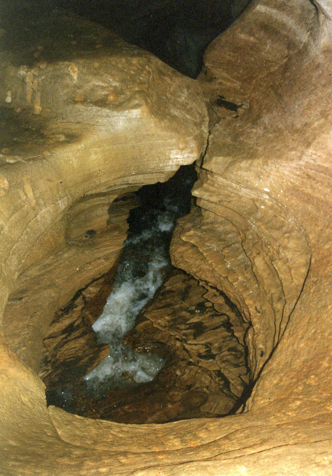 Strudelloch in der Grönligrotta